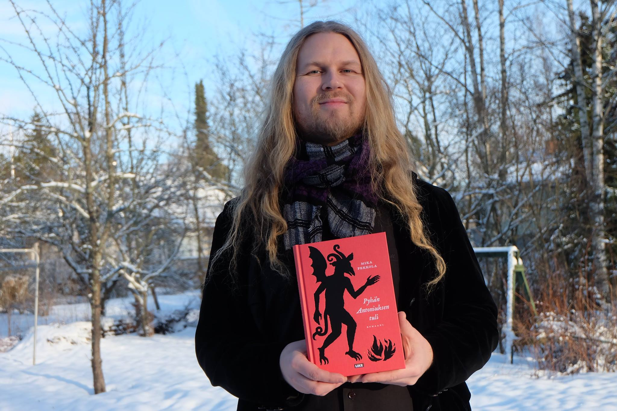 Mika Pekkola Pyhän Antoniuksen tuli 2016